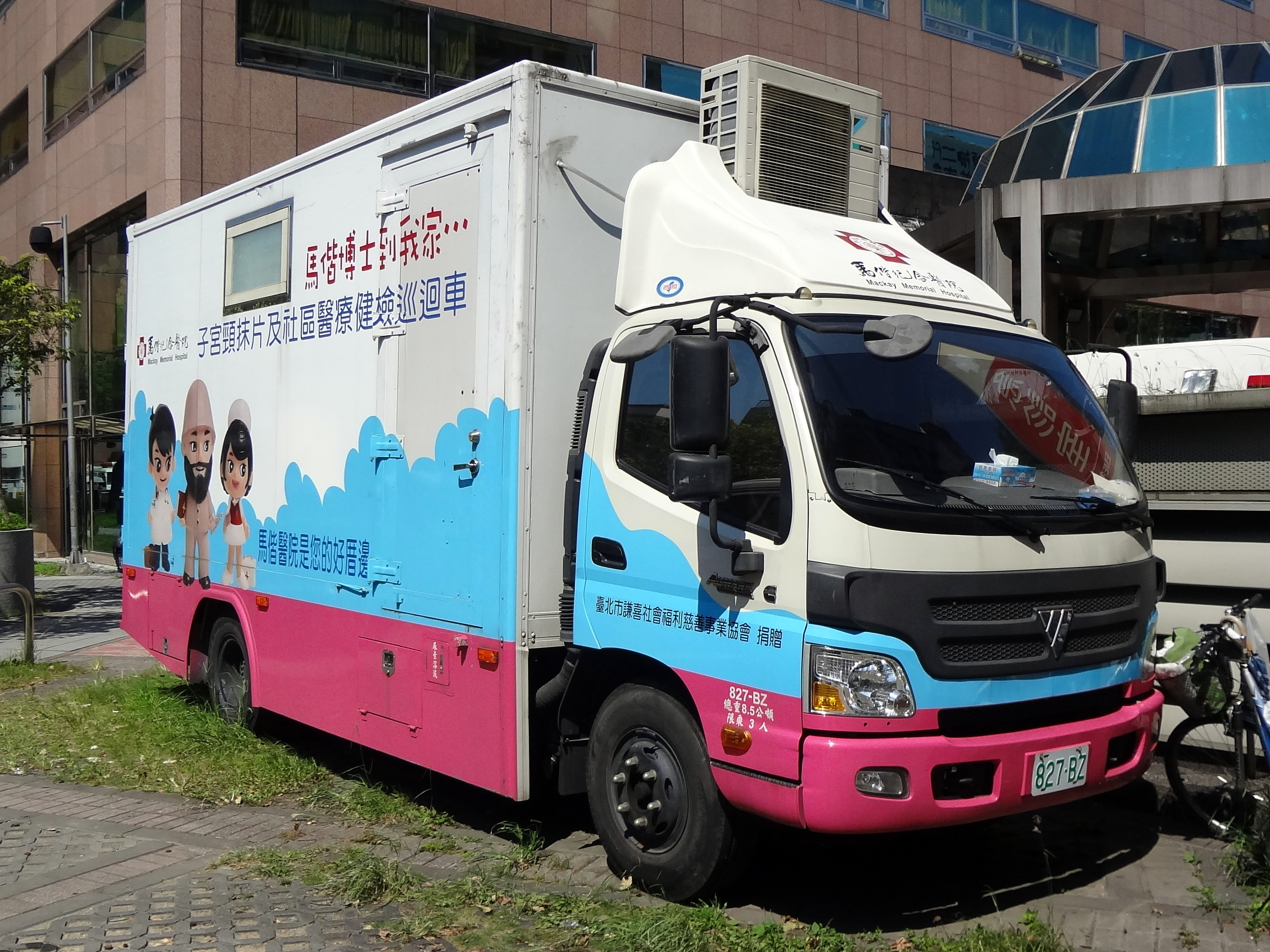 馬偕紀念醫院福田Aumark社區醫療健檢巡迴車827-BZ。